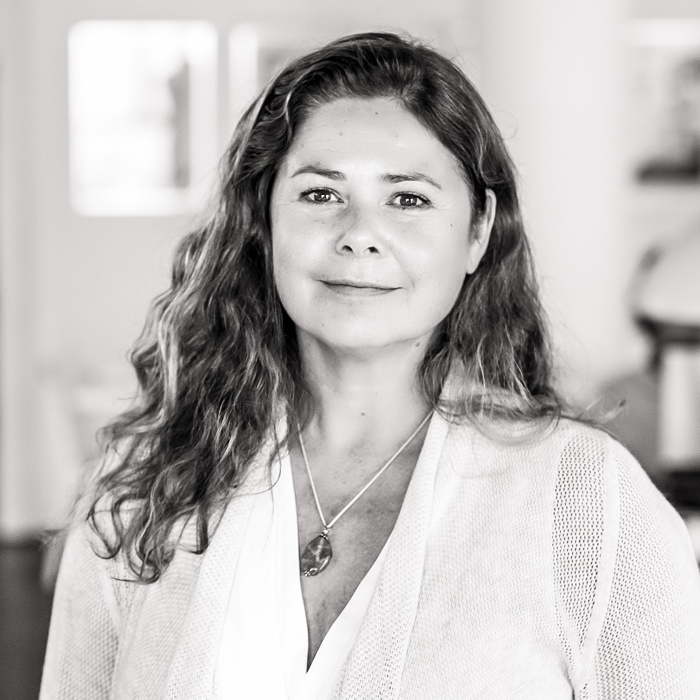 Hanneke Niens in 2016